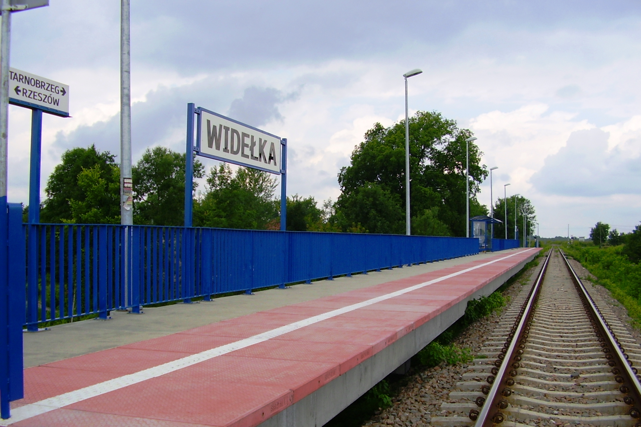 Przystanek kolejowy w Widełce, 2011-07-29